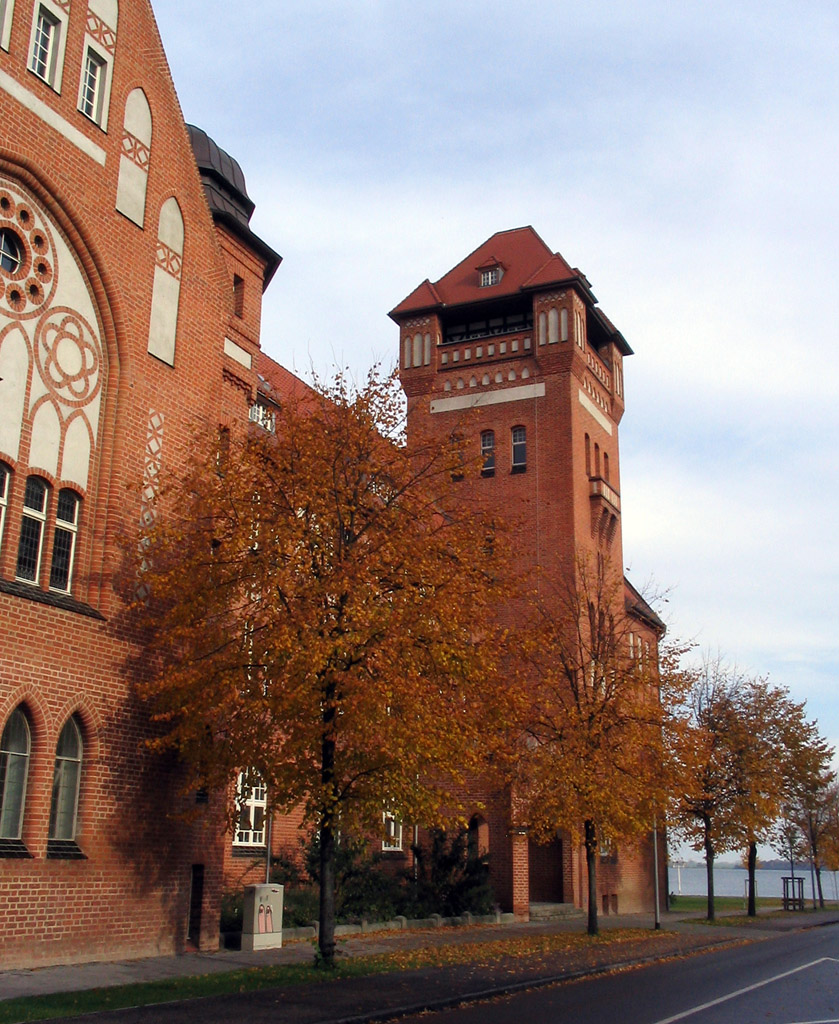 Beschreibung: Hansa-Gymansium Stralsund Fotograf: Darkone, 25. Oktober 2004